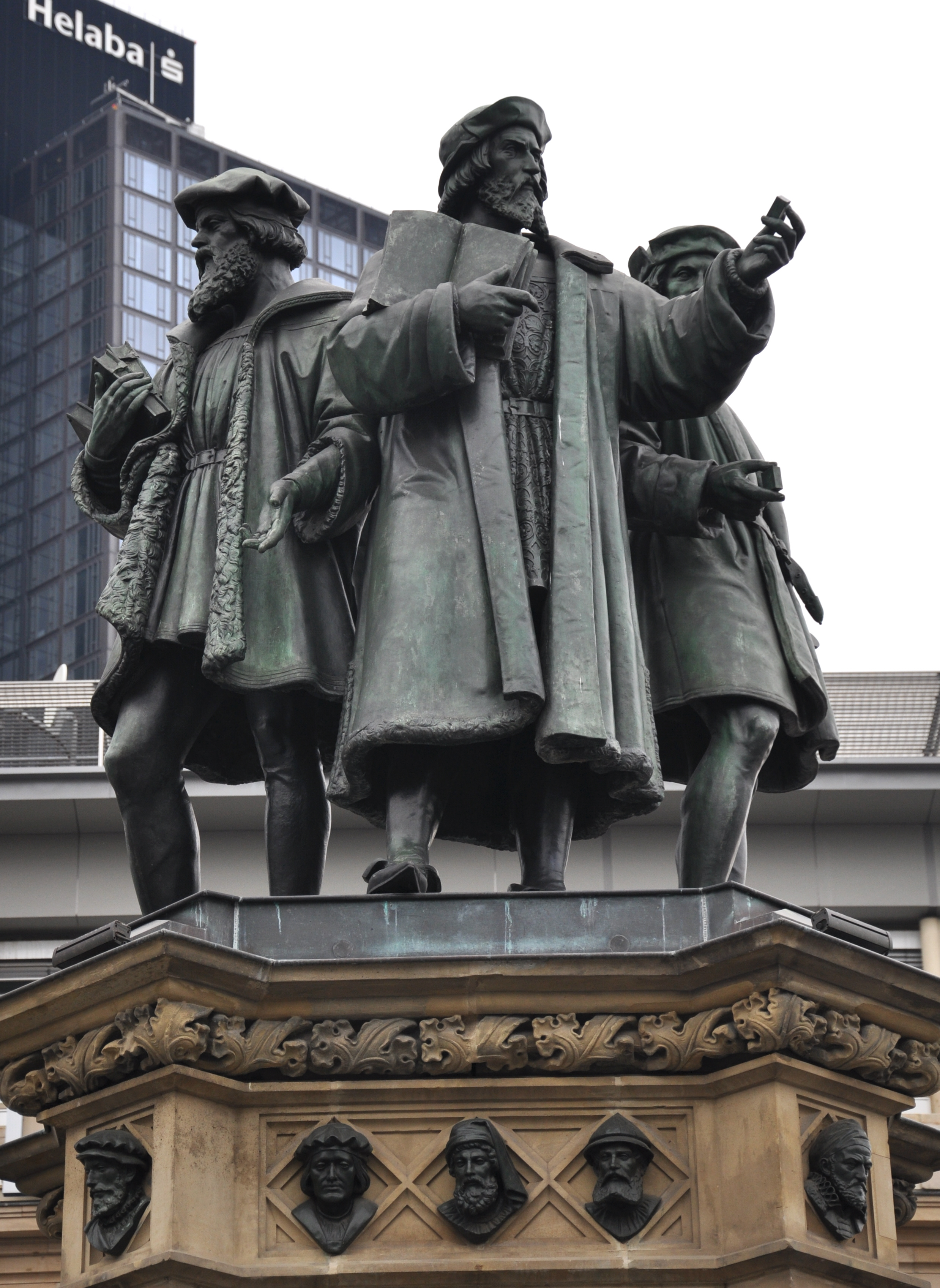 Frankfurt am Main, Gutenberg-Denkmal von Eduard Schmidt von der Launitz (1840) am Roßmarkt Statuen von Gutenberg, Schöffer und Fust